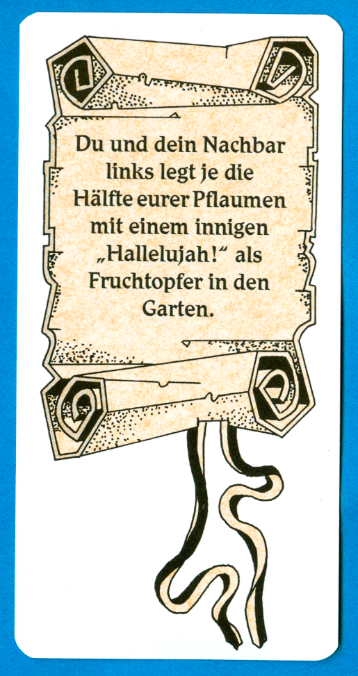 Card of Game "Schraumen"